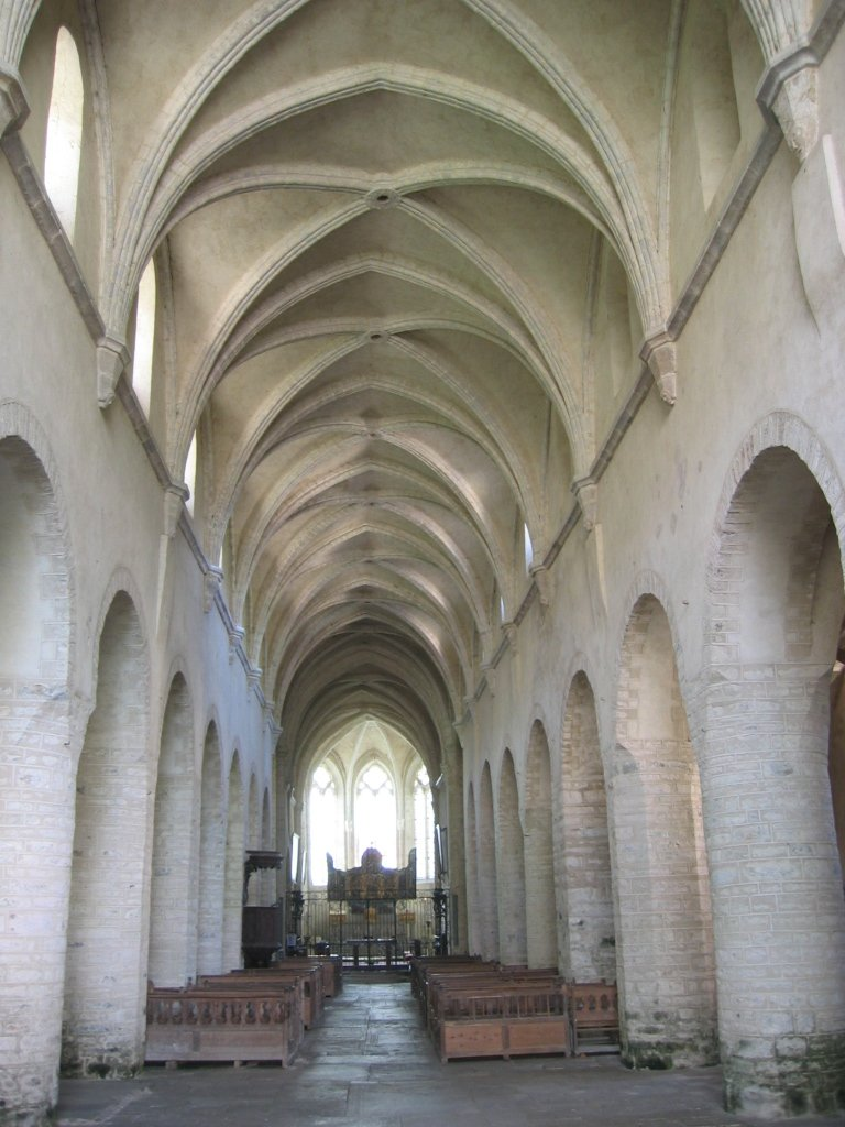 Baume les Messieux - Franche Comté - France